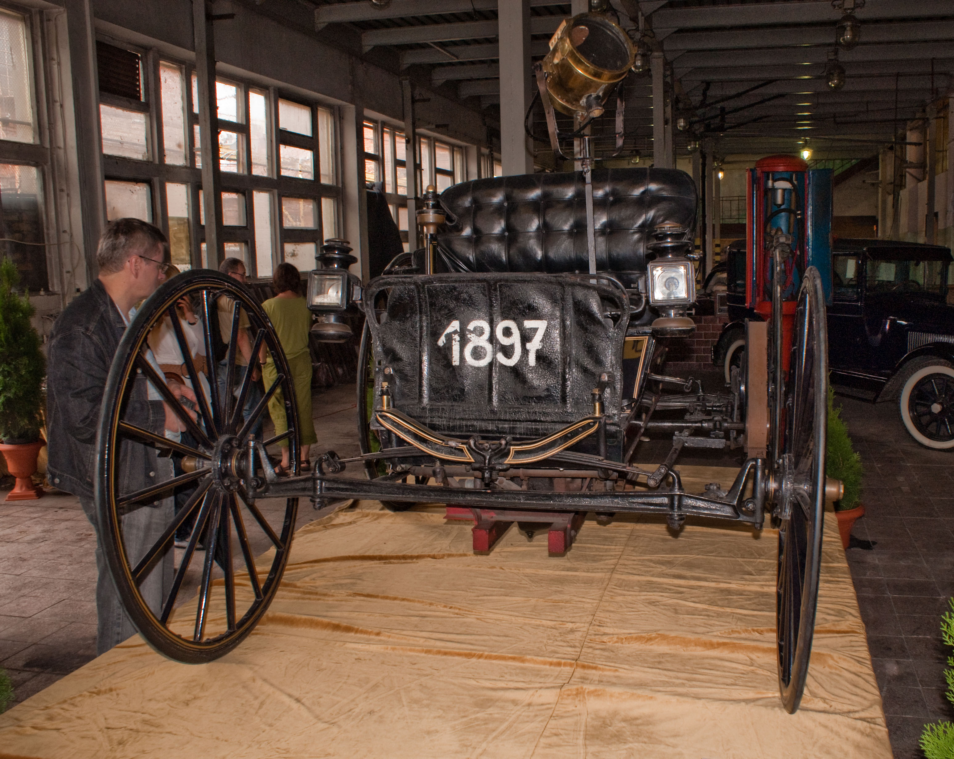 Samochód J.A.G. rocznik 1897, wyprodukowany w USA. W obecnej chwili (2010) jest najstarszym pojazdem w zbiorach polskich. Jego paliwem była nafta, prędkość maksymalna wynosiła 17,5 km/h. Jednorazowa trasa, jaką mogło pokonać auto wynosiła 5 km, ponieważ wówczas należało wykonać smarowanie tłoka i korbowodu, co mogło się odbyć dopiero po zatrzymaniu silnika. Wystawa samochodów Prywatnego Muzeum Motoryzacji i Techniki w wytwórni Wódek Koneser.